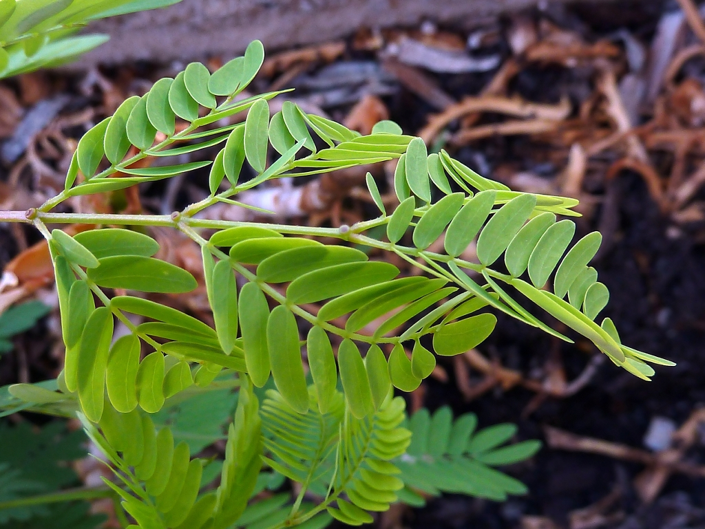 Leucaena leucocephala - Hoja bipinnada jóven con glándulas en las bifurcaciones de los raquis secundarios - Águilas (Murcia, España).